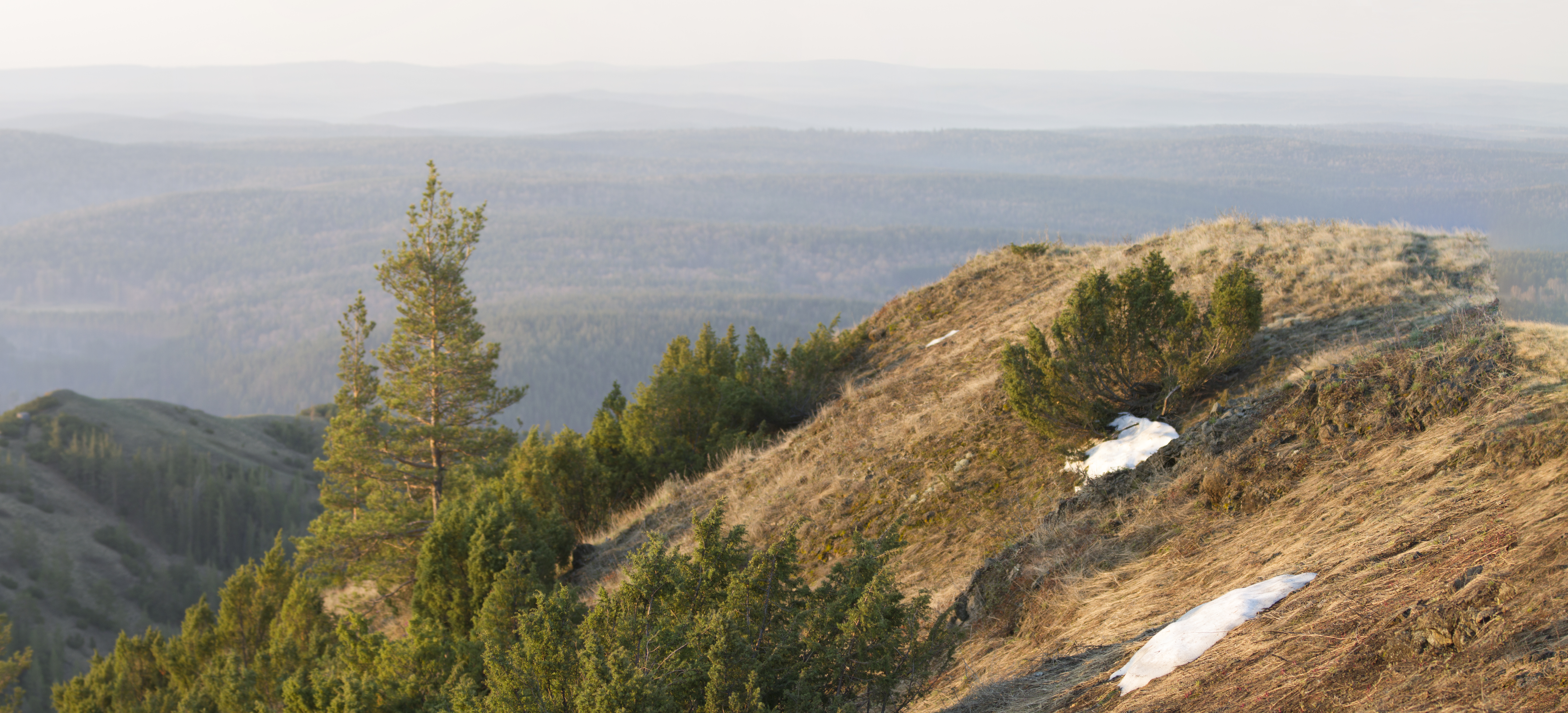 Башкирский государственный природный заповедник, Бурзянский район This image is related to the protected area of Russia number 0200099